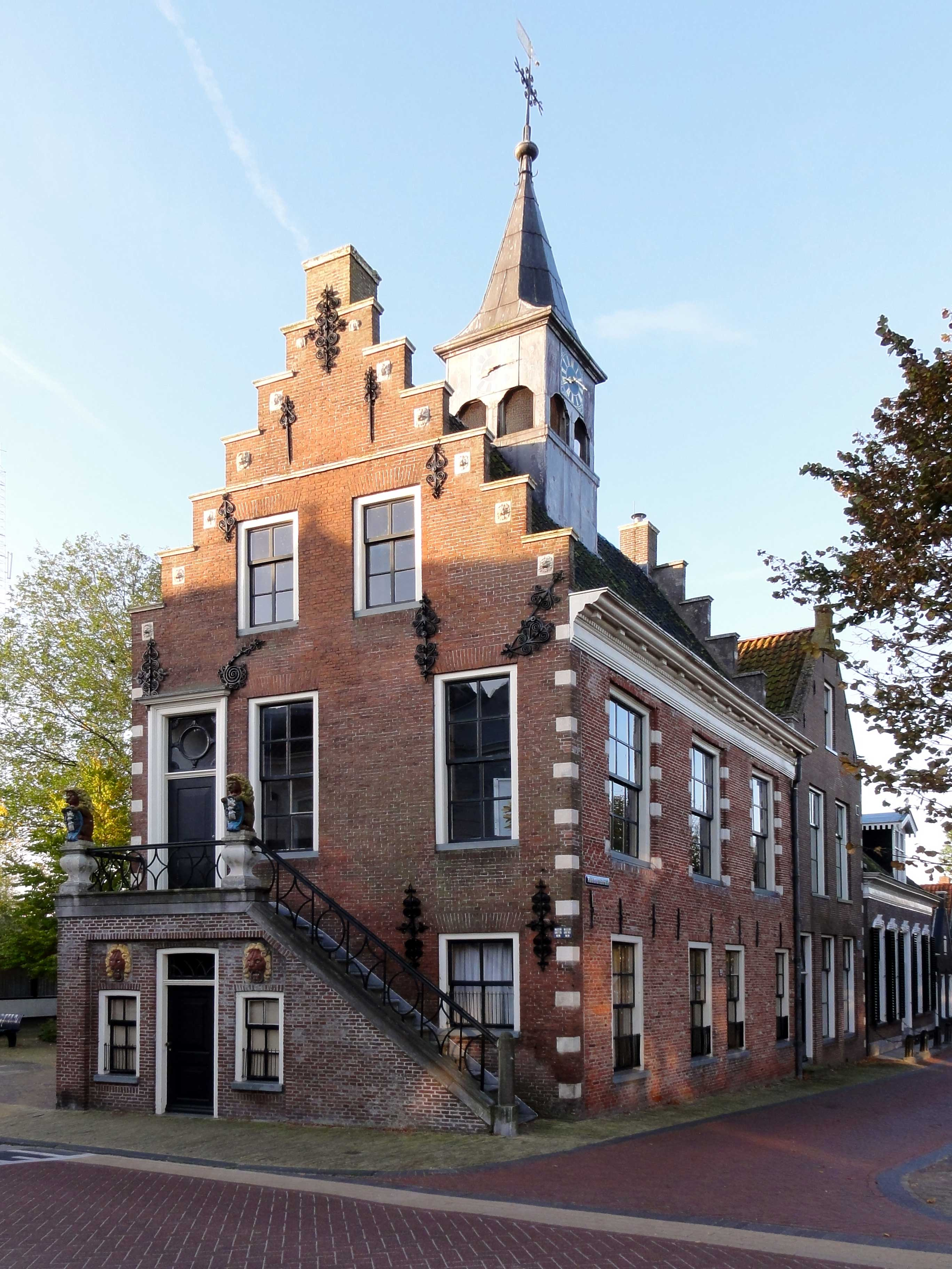 Voormalig Raadhuis van Balk